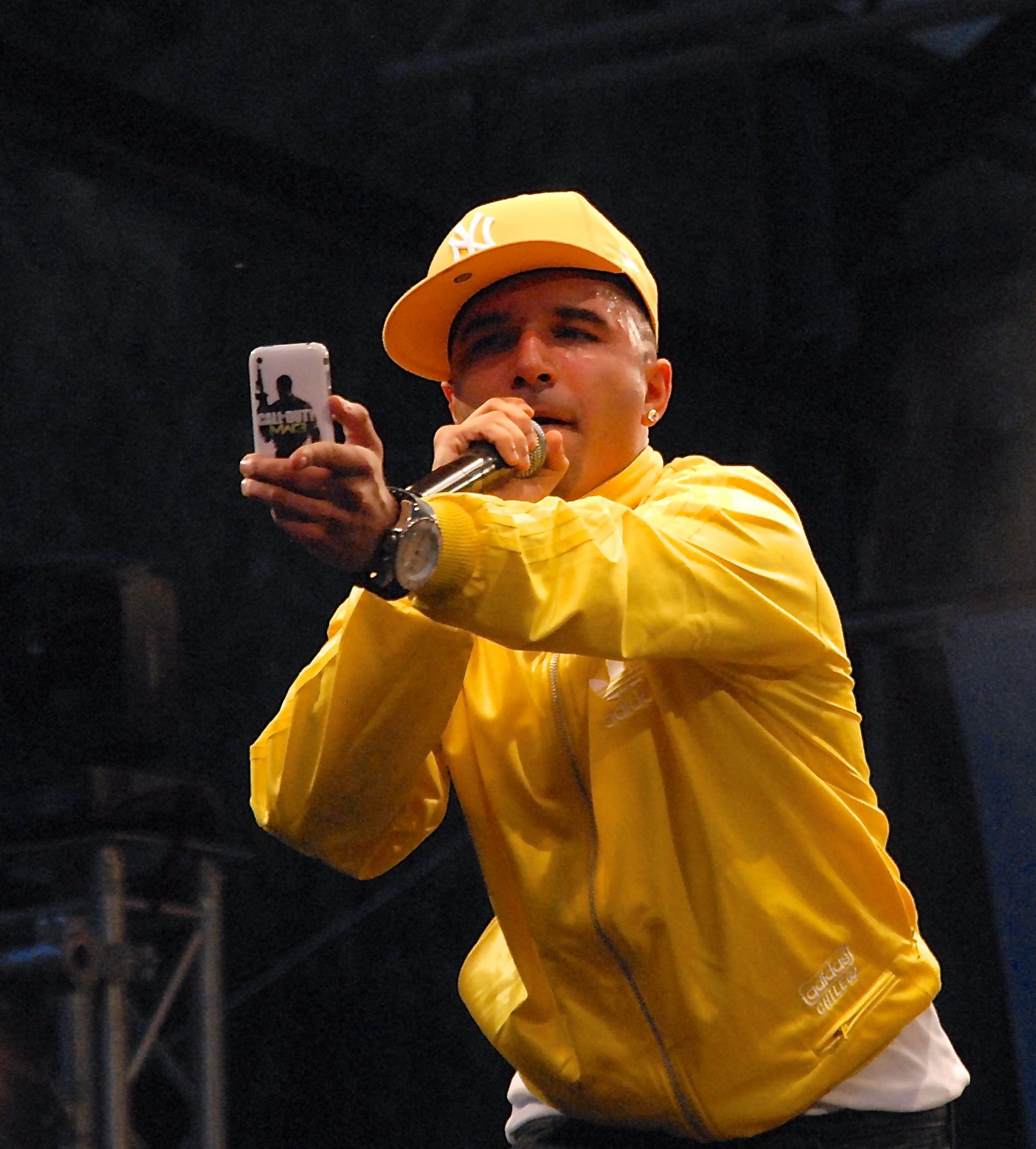 Sean Banan på Ung-08-festivalen i Stockholm den 20 augusti 2011.